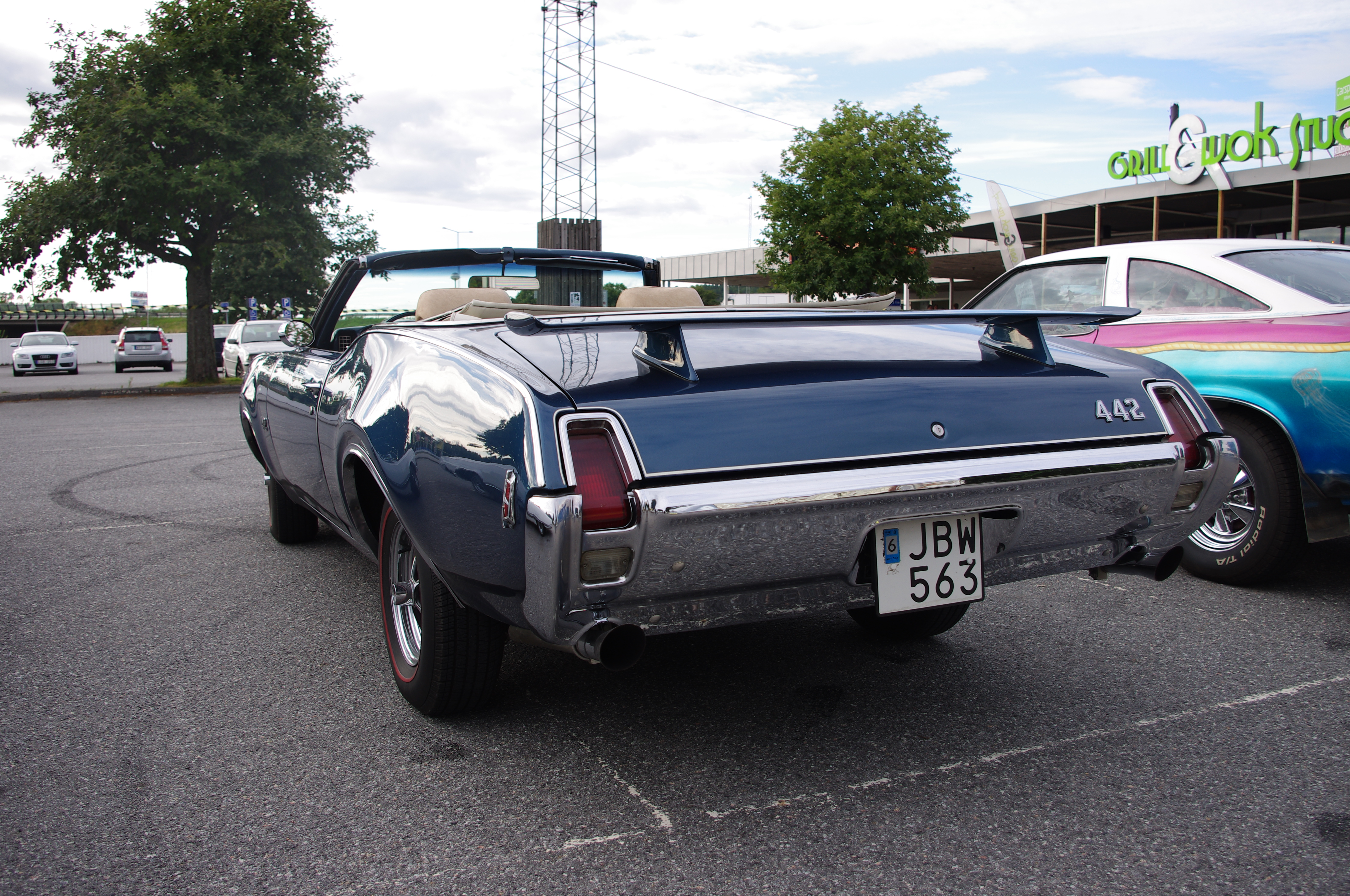 Oldsmobile